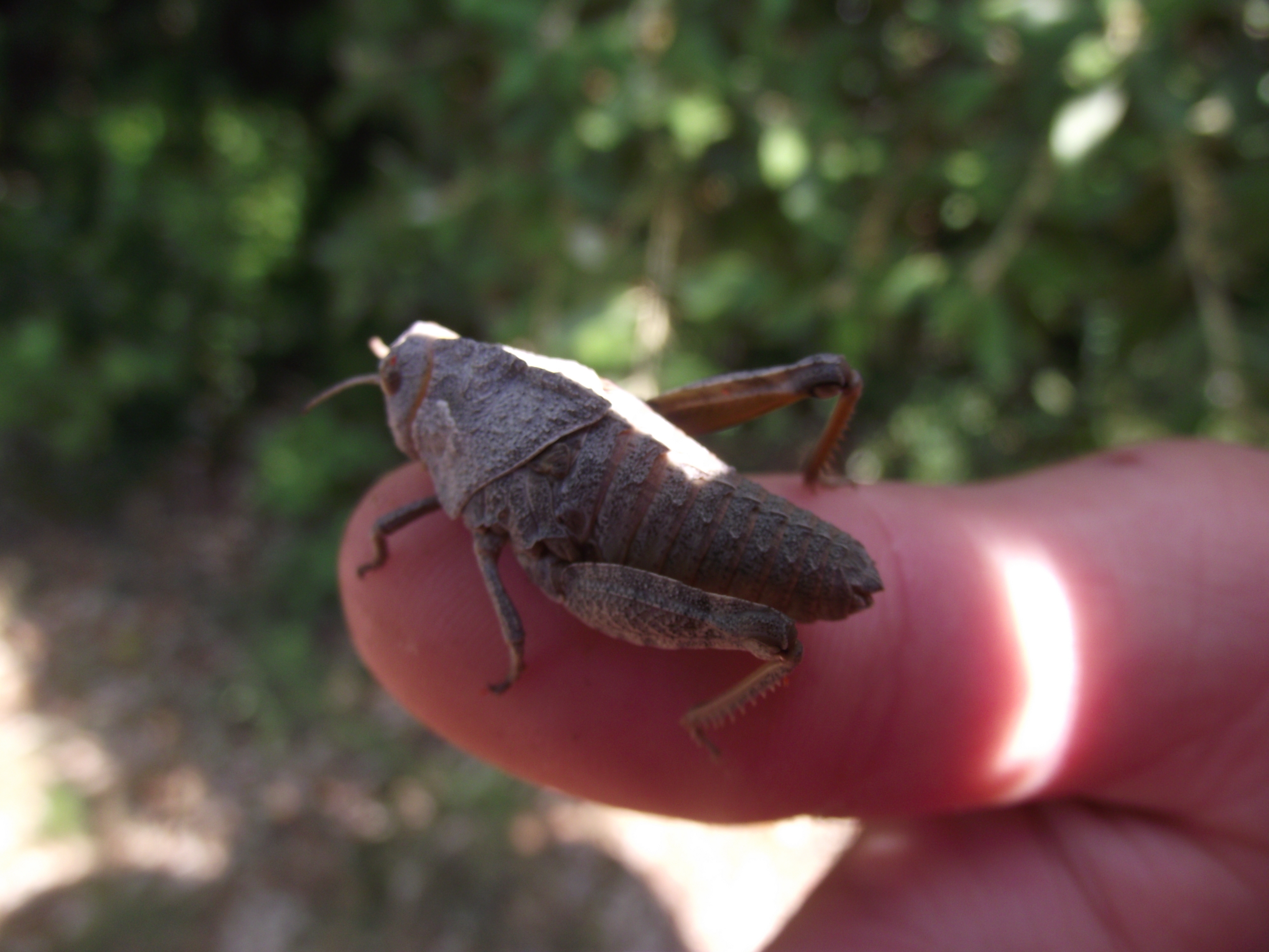 Prionotropis hystrix azami Uvarov, 1923 Criquet hérisson (Français) (Arthropoda, Insecta)